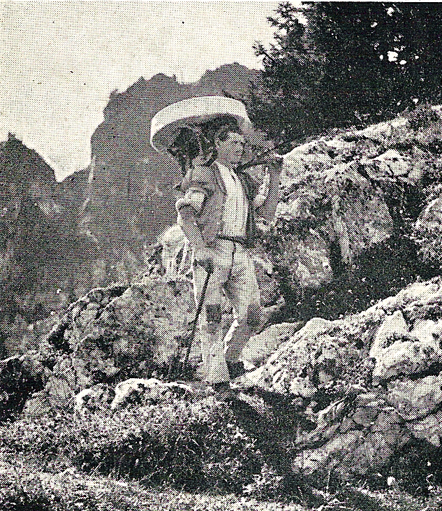 Armailli descendant un fromage de l'alpage avec l'oji (extrait d'un jeu du XIXe siècle)